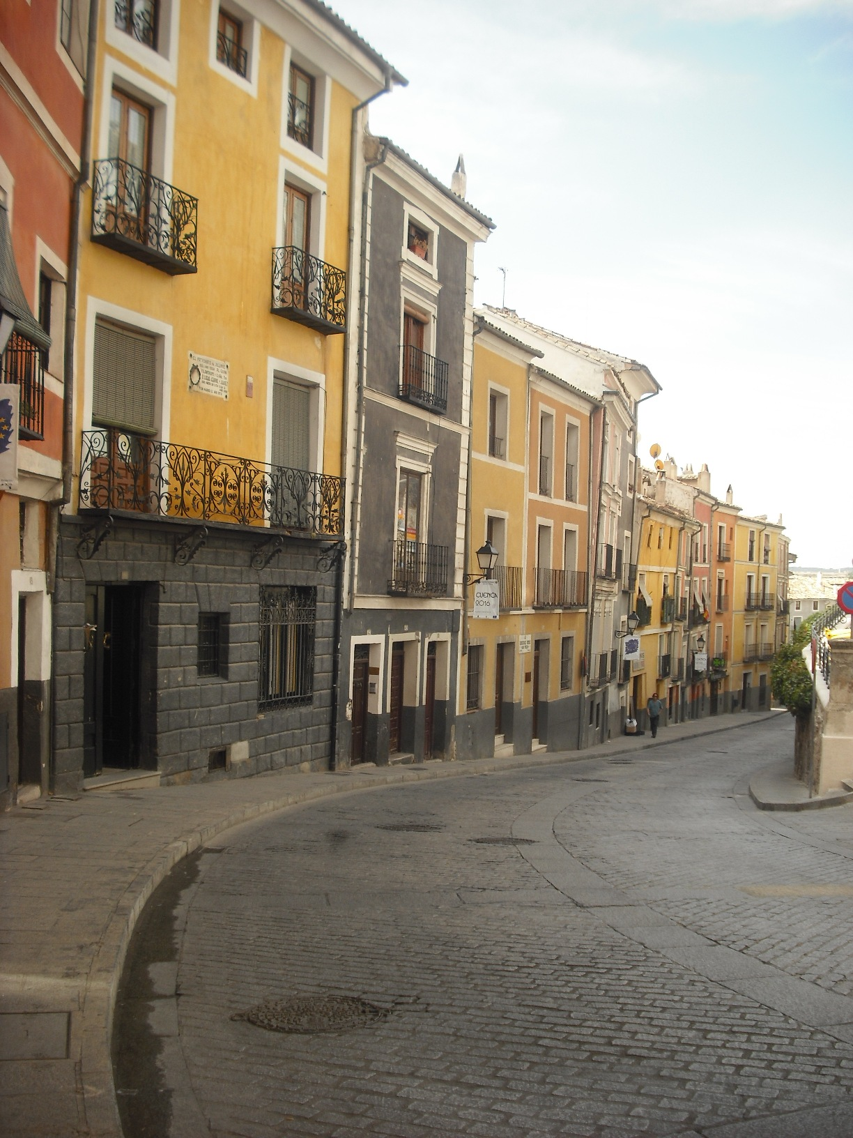 Calle de Alfonso VIII de Cuenca.